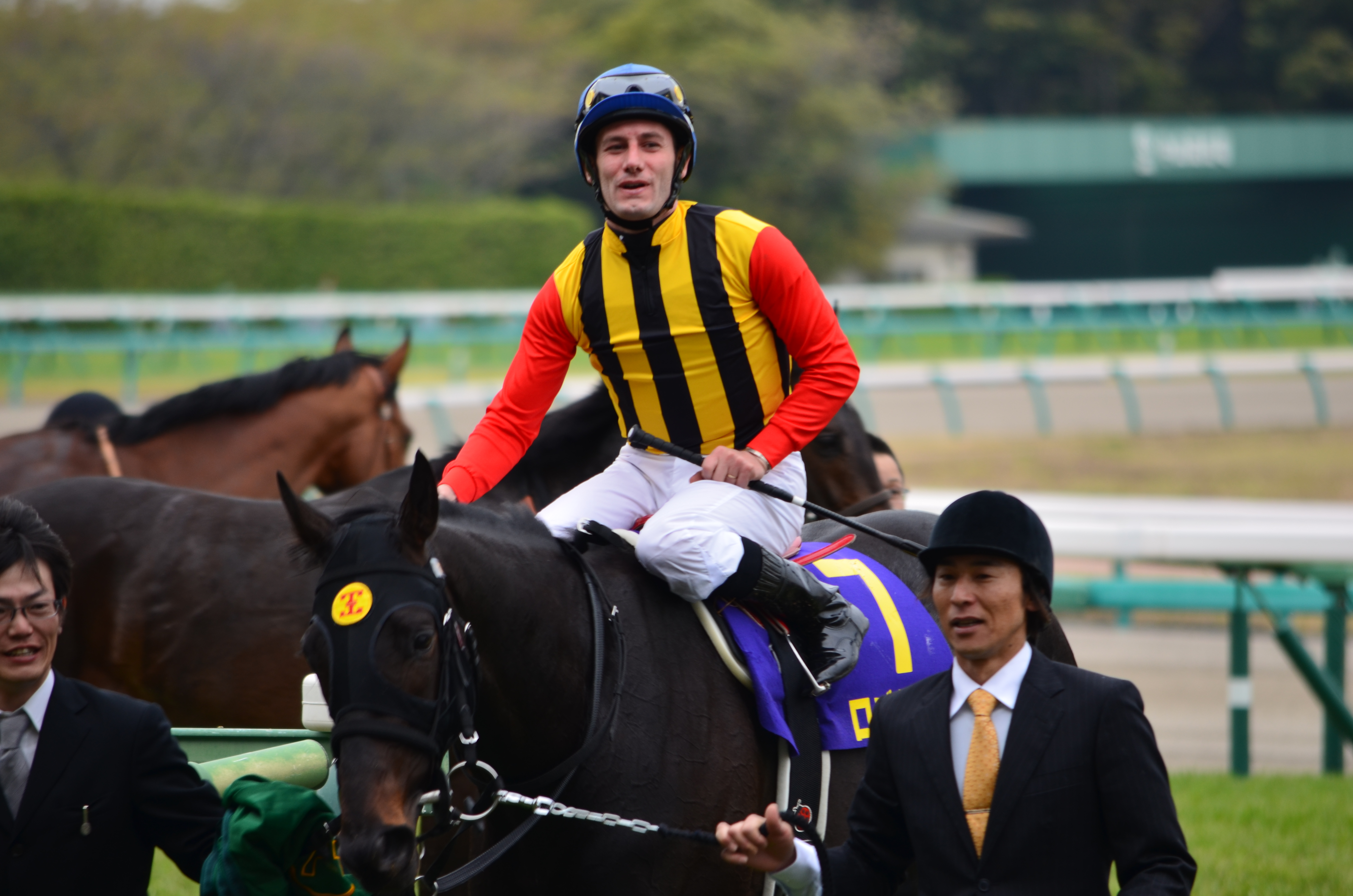 ２０１３年中山競馬場で行われた皐月賞の写真です。